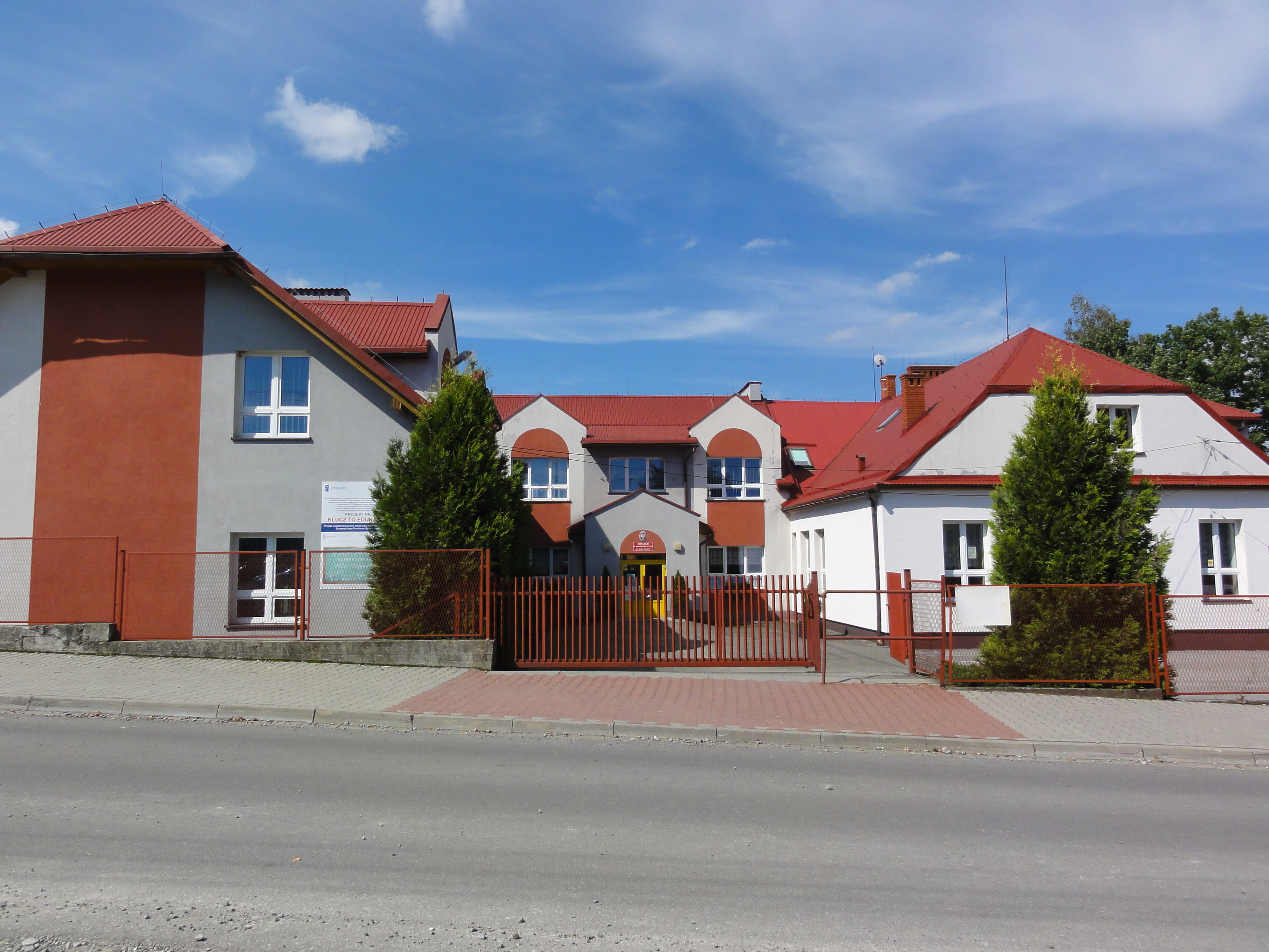 Szkoła Podstawowa im. Marii Konopnickiej i Gimnazjum im. Jana Pawła II w Twardorzeczce